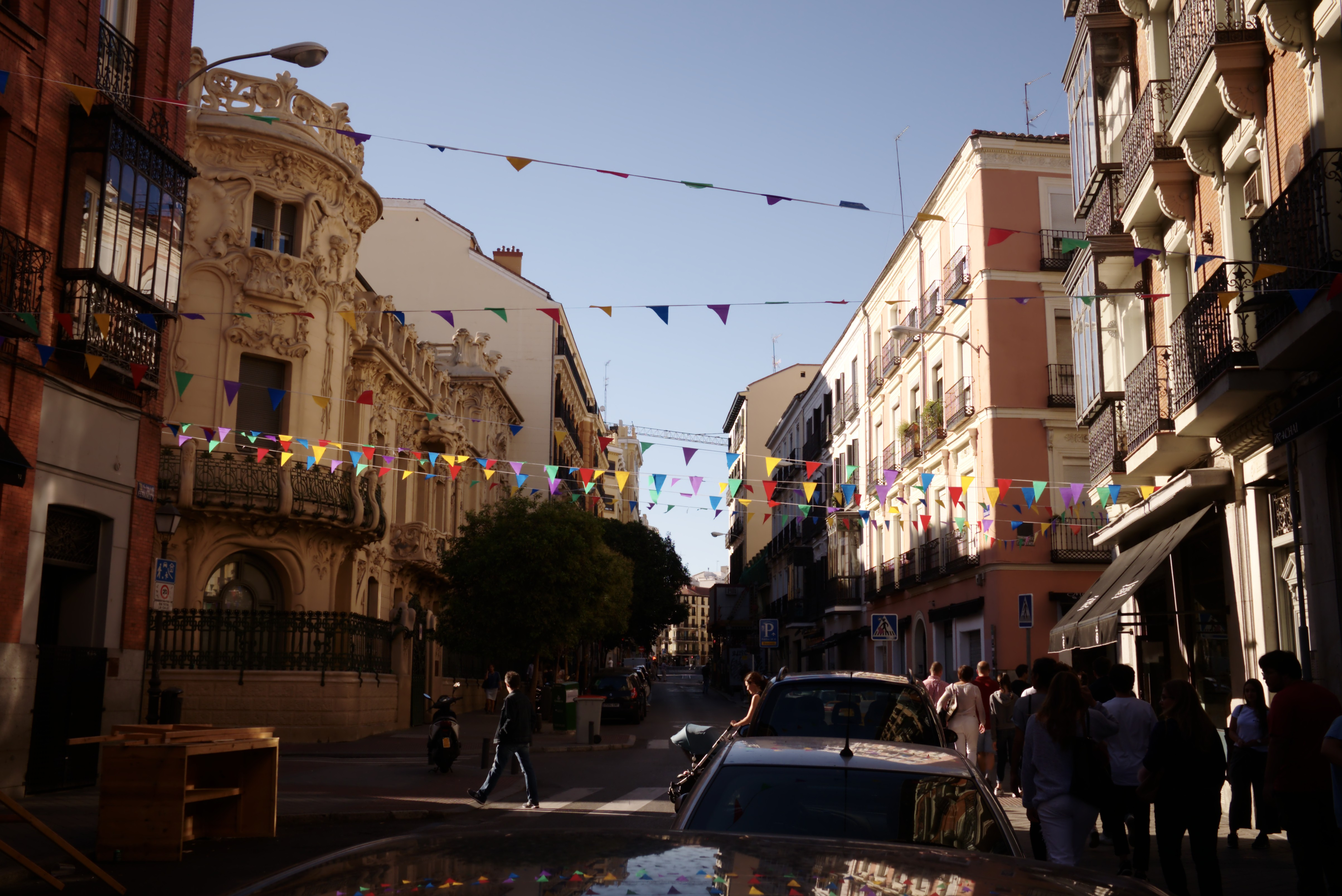 Madrid